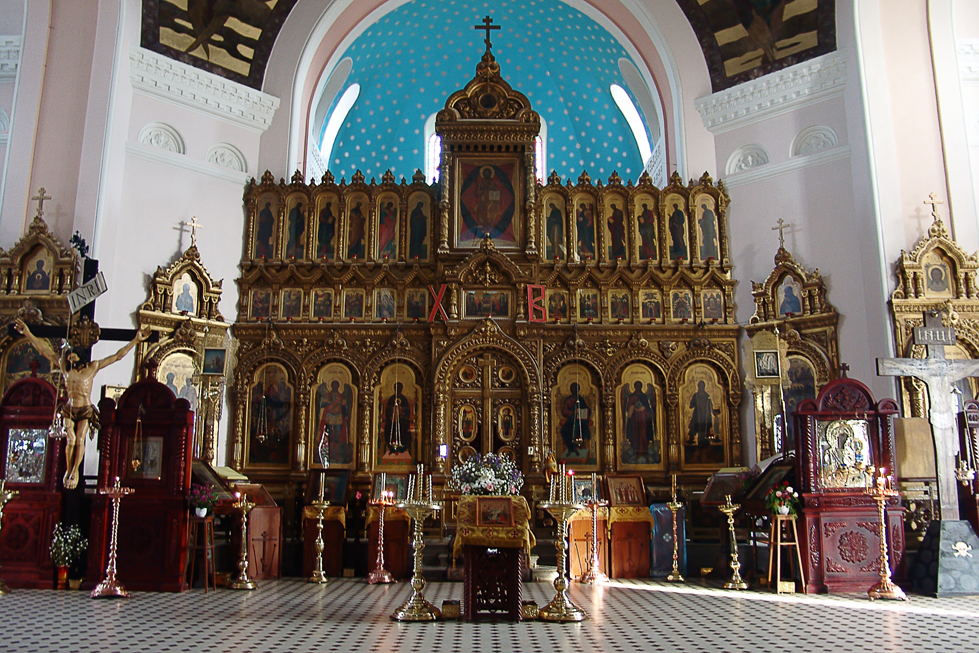 Иконостас